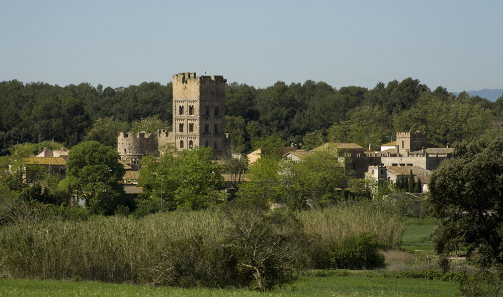 cultural heritage of Spain RI-51-0000563